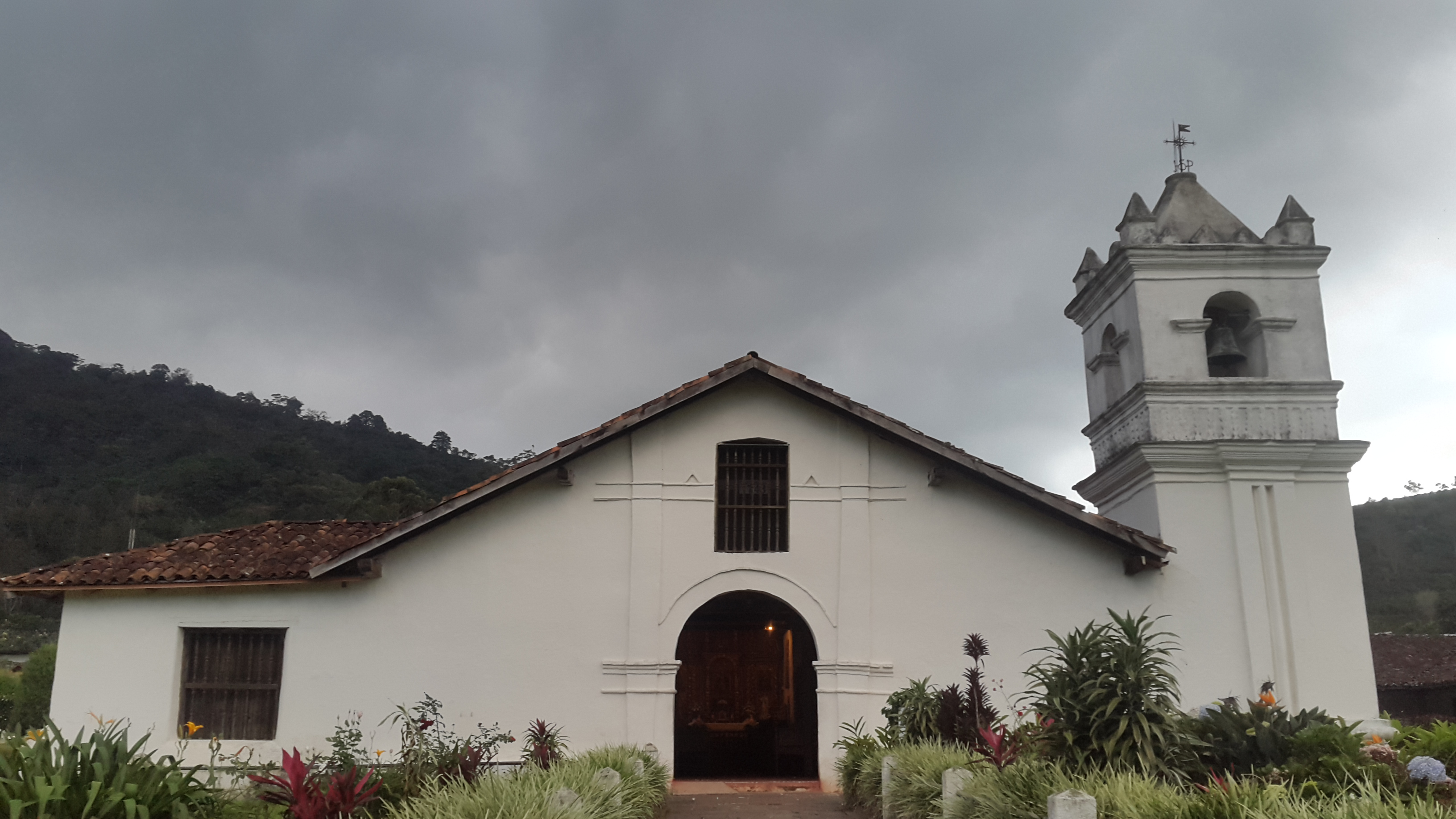 Iglesia de San José de Orosi, cantón de Paraíso, provincia de Cartago, Costa Rica. Construida en 1767 por misioneros franciscanos, es la iglesia más antigua de Costa Rica. Declarada Monumento Nacional en 1920.